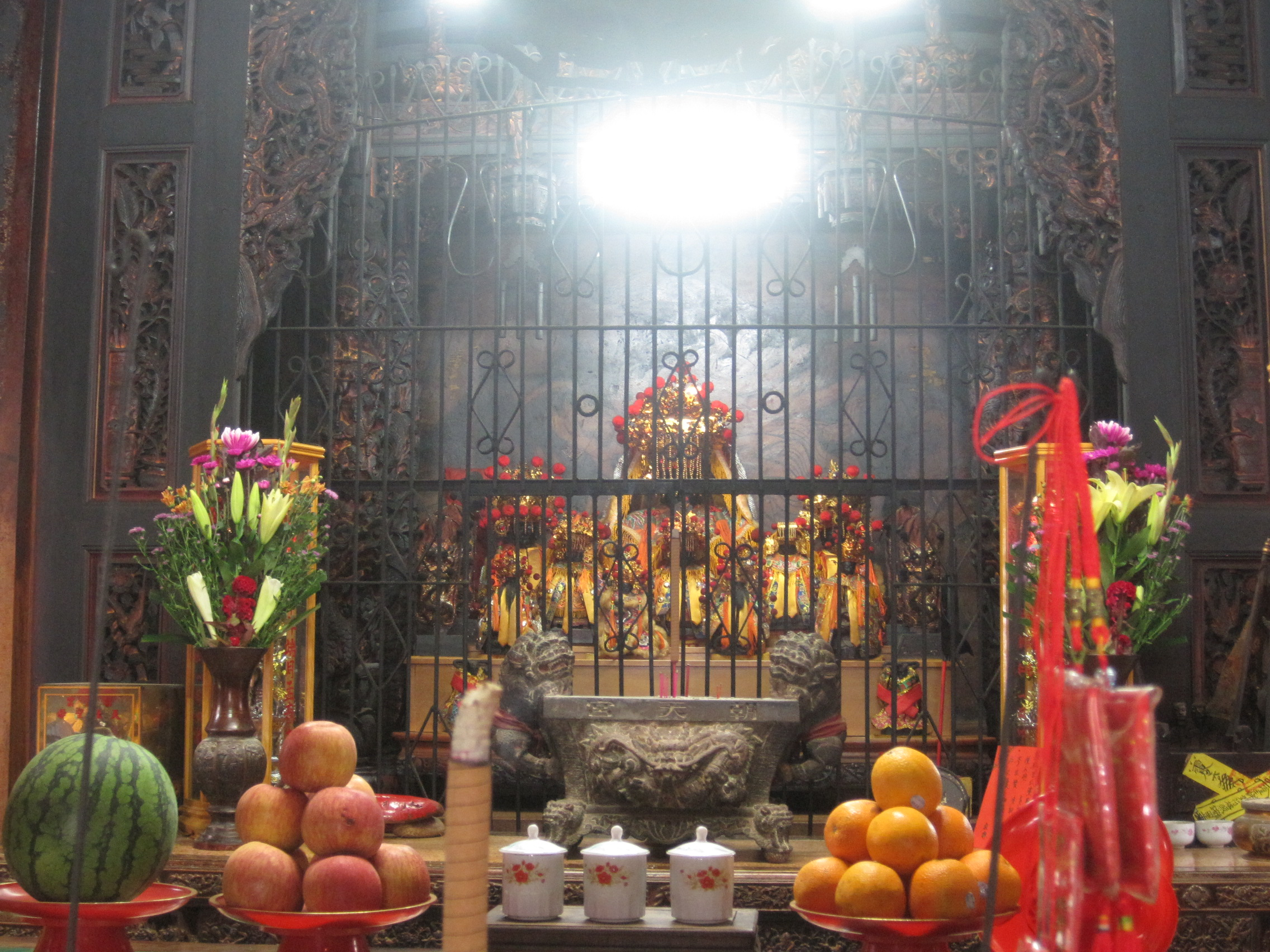 苦瓜寮朝天宮內景